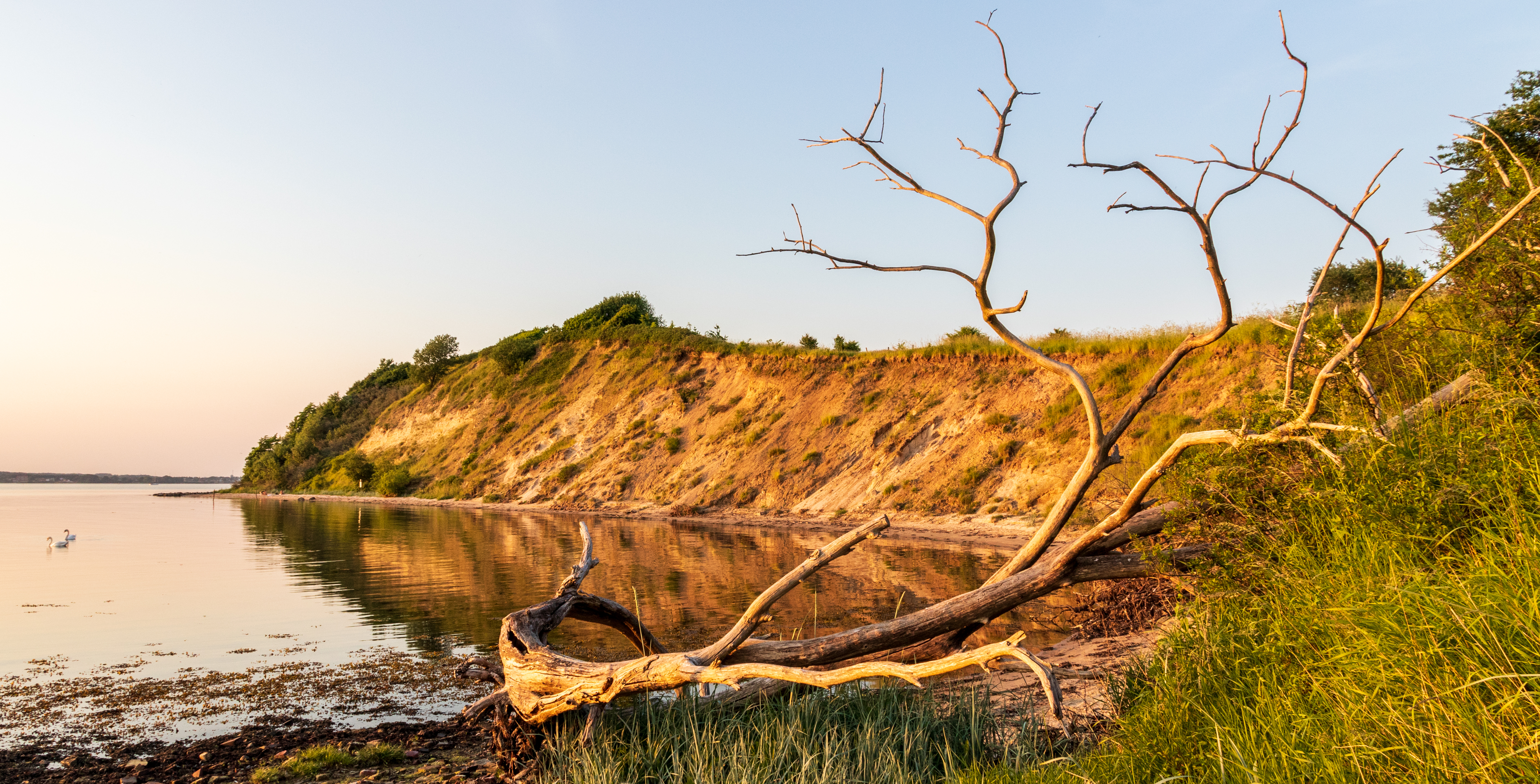 Steilküste im Naturschutzgebiet Halbinsel Holnis